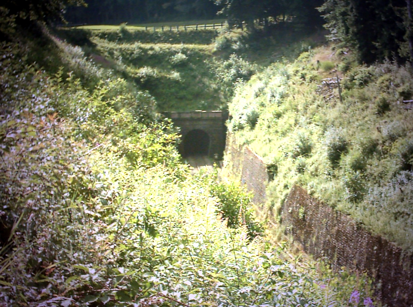 Krähbergtunnel-Portal Ostseite Fotograf: presse03, selbst fotografiert 2005 Lizenz: GNU-FDL